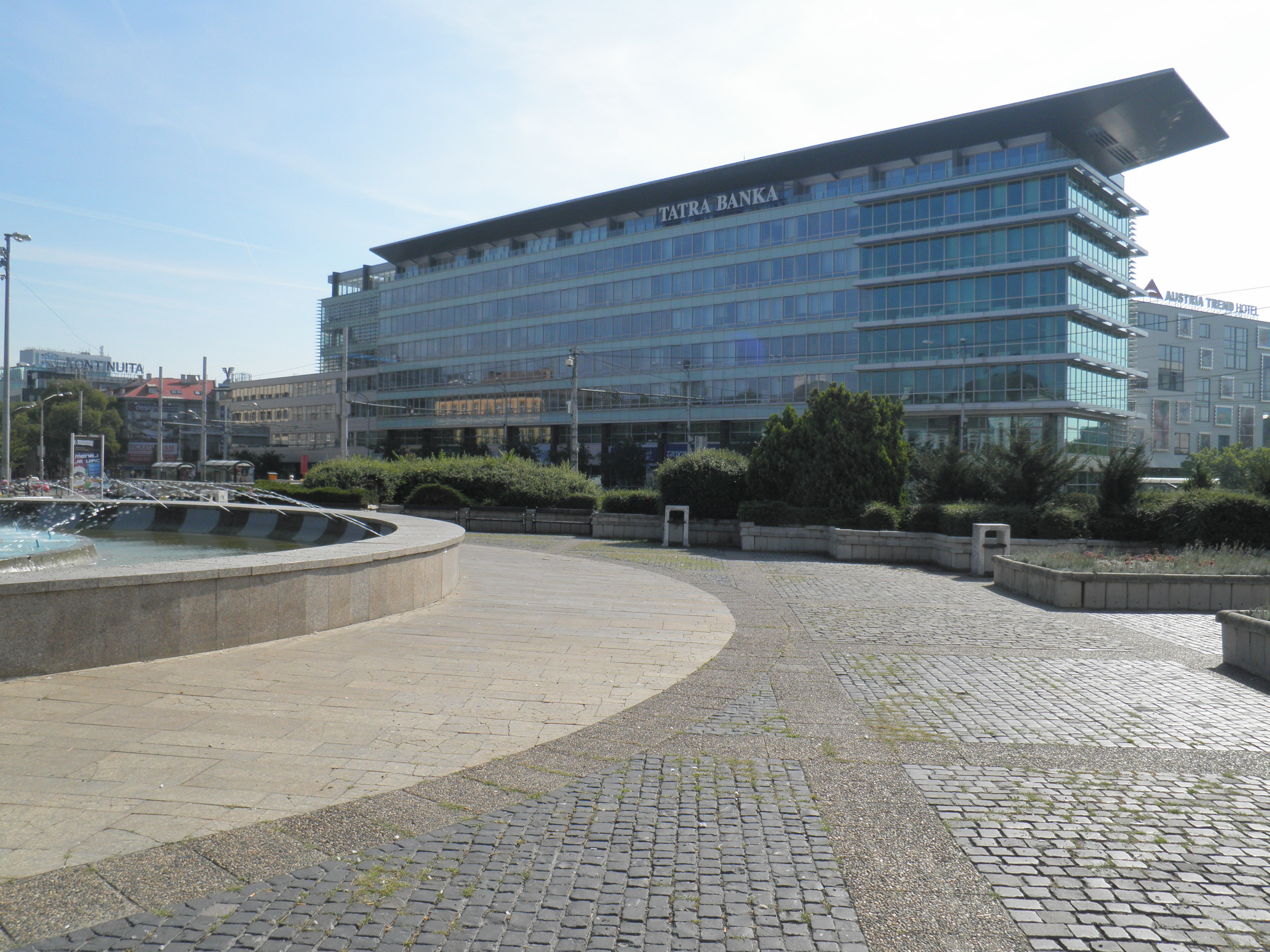 Tatra banka